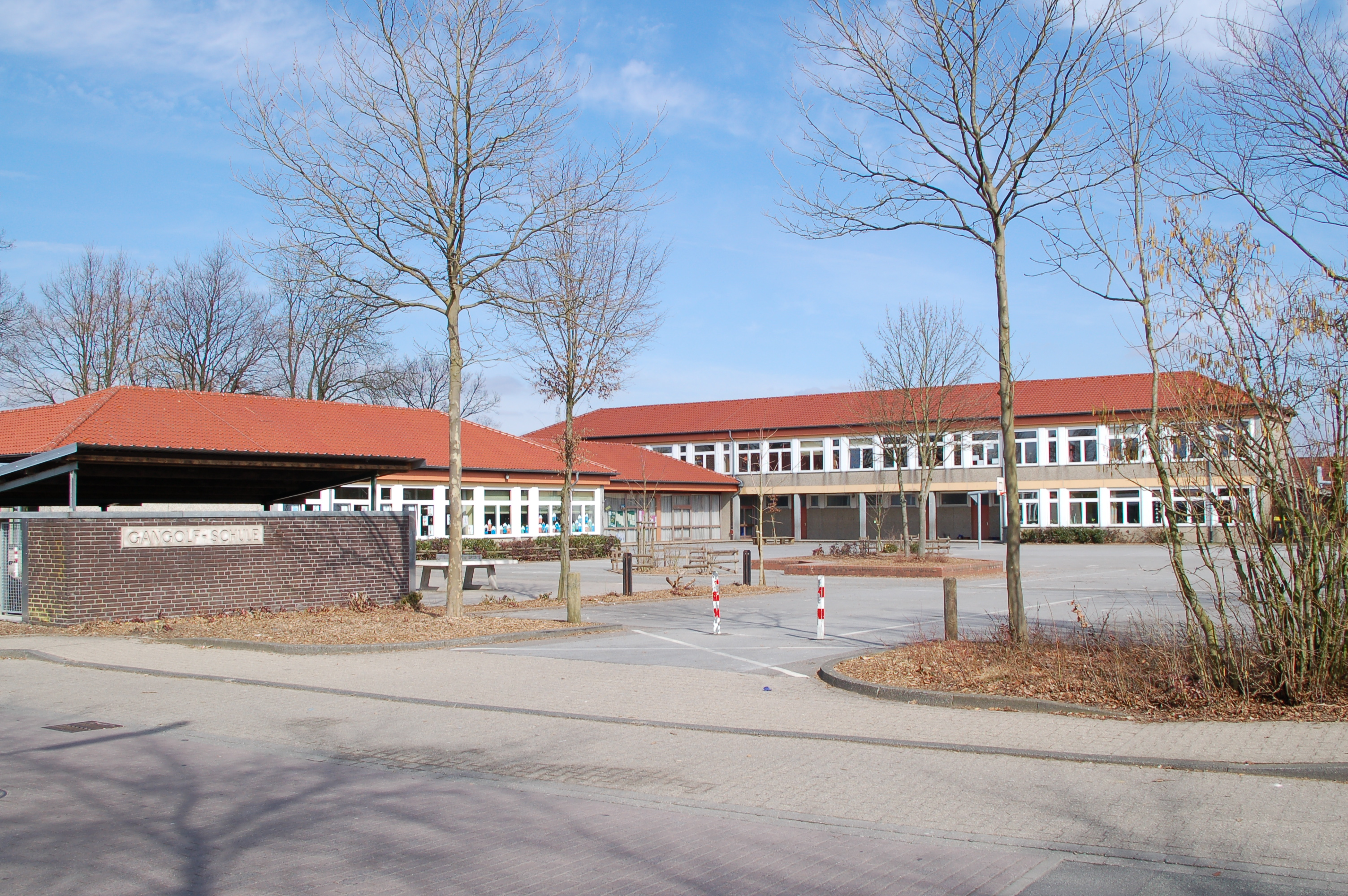 Die Gangolfgrundschule in Nordwalde